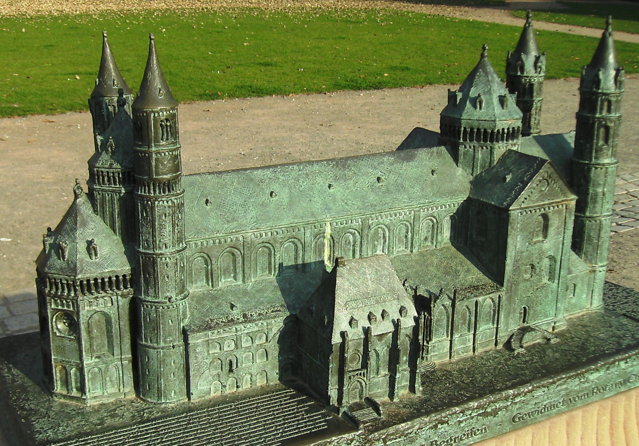 Worms: Kupfermodell des Wormser Doms (Standort vor dem Dom)